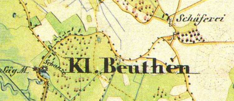 Kleinbeuthen auf dem Urmesstischblatt, 1:25000, Blatt Trebbin (Nr.3745) von 1840, Kleinbeuthen, Gemeindeteil von Großbeuthen, Ortsteil Trebbin, Brandenburg, Deutschland